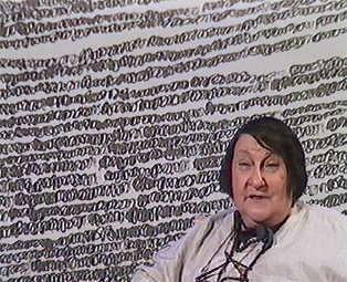 Portrait de Pierrette Bloch